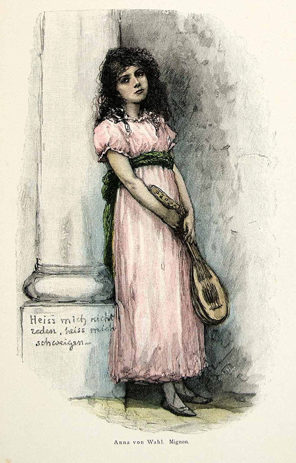 Mignon